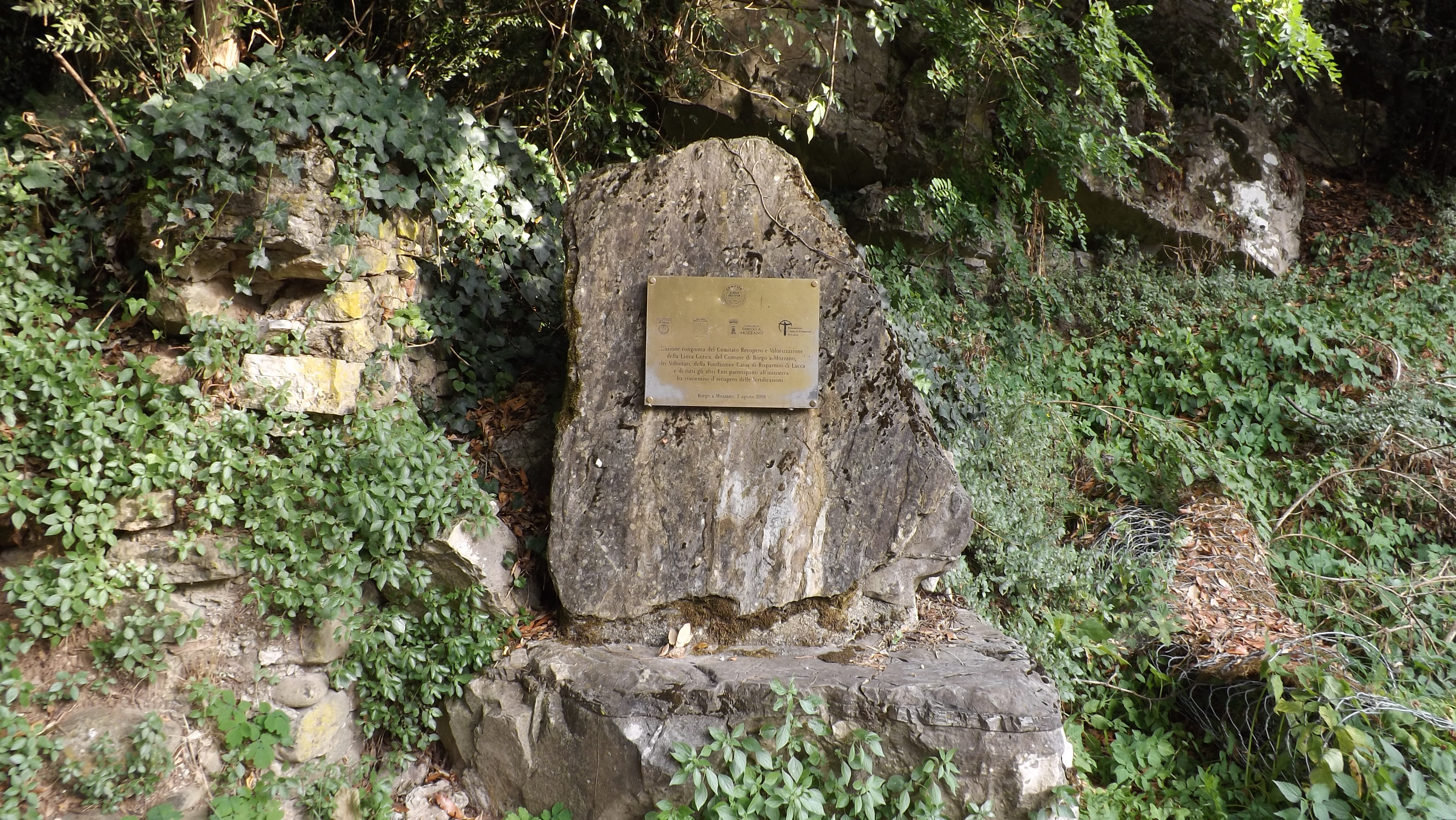 Linea Gotica Anchiano, Borgo a Mozzano (LU)